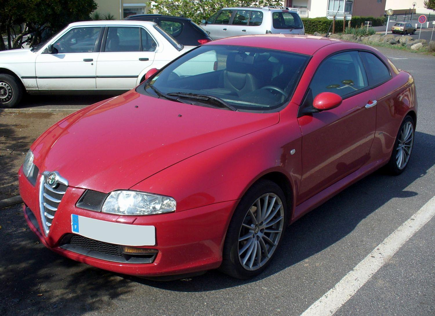 Alfa Romeo GT